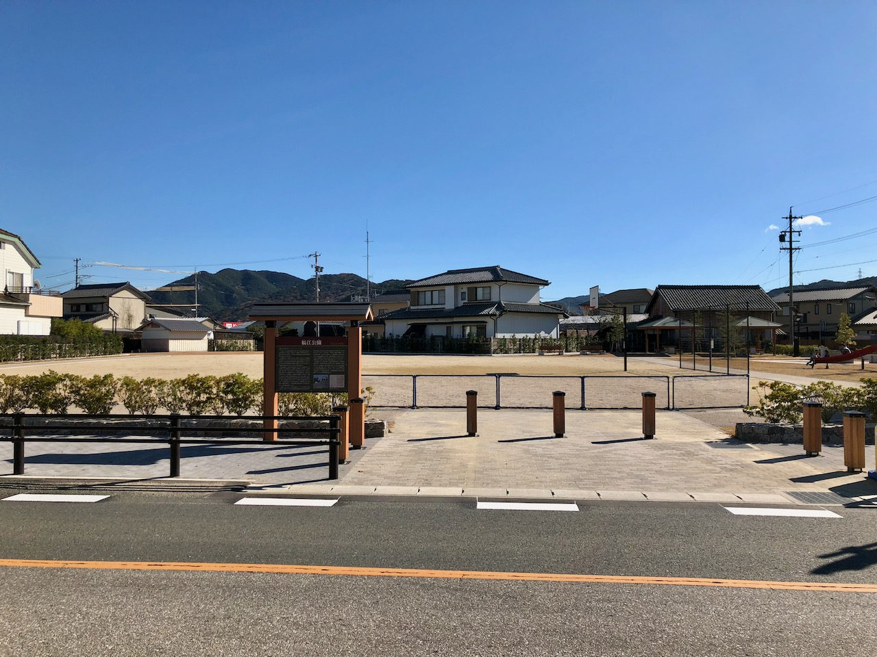 大垣新田藩畠村陣屋跡地